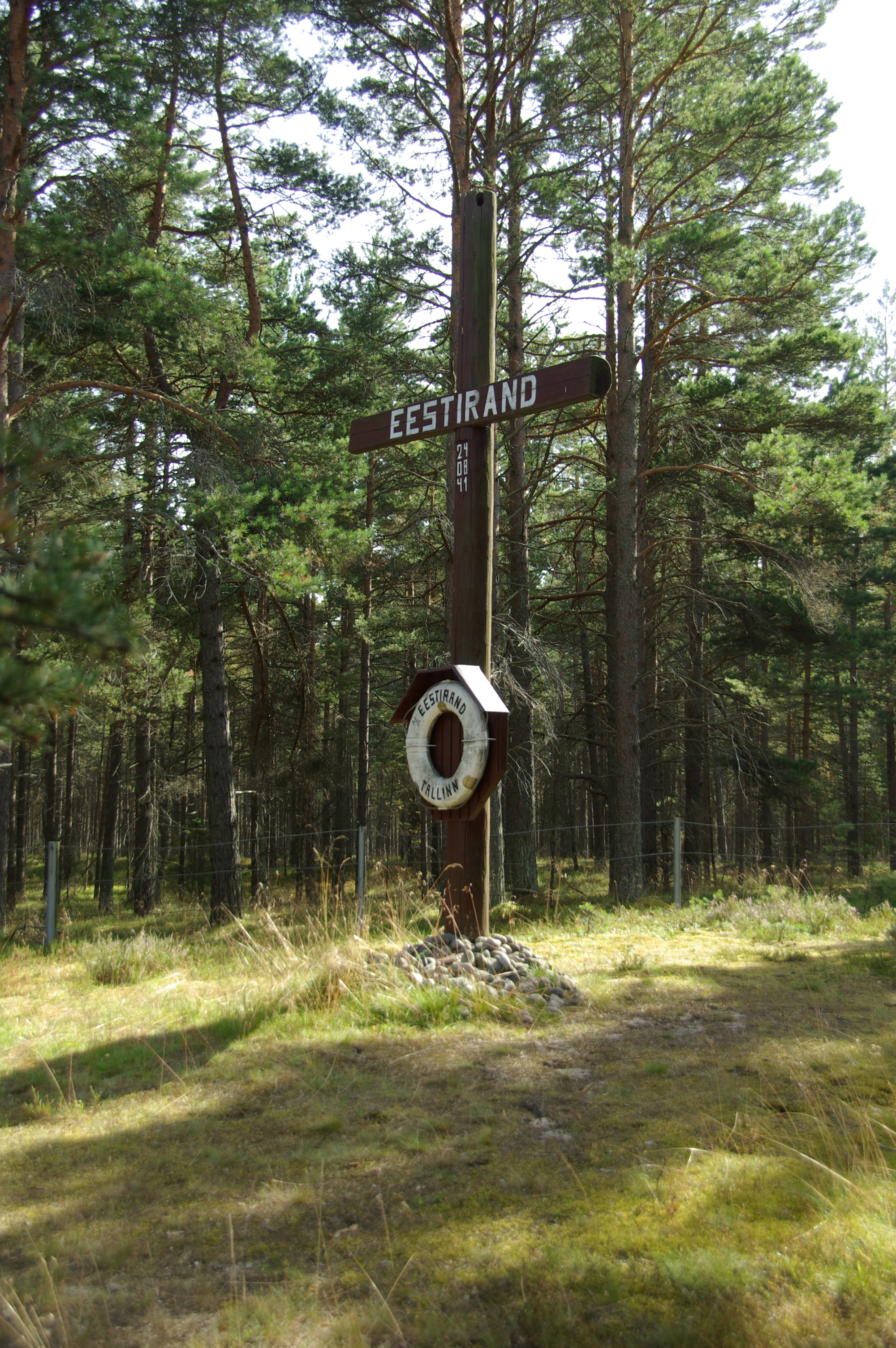 Harju maakond, Viimsi vald, Prangli saar, Idaotsa küla